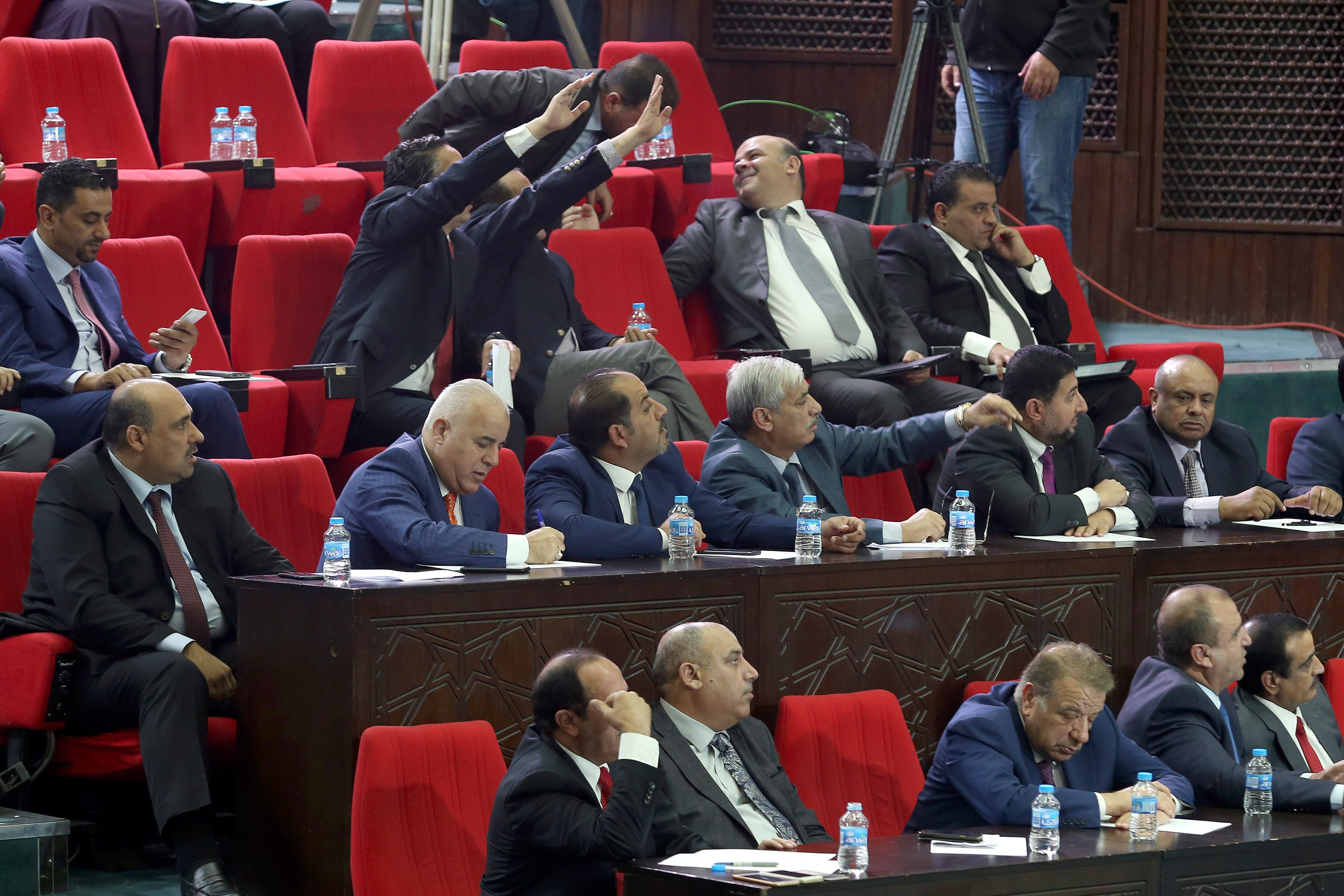 جلسة مجلس النواب الأردني بخصوص حادثة البحر الميت يوم 5/11/2018